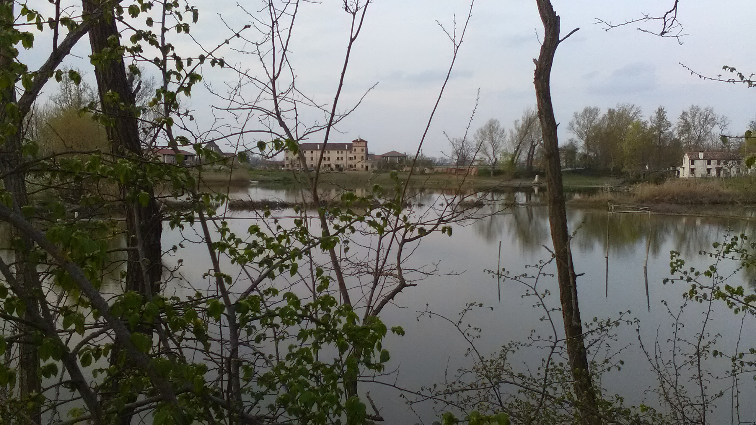 Gorgo Gàspera a Trecenta (Rovigo)